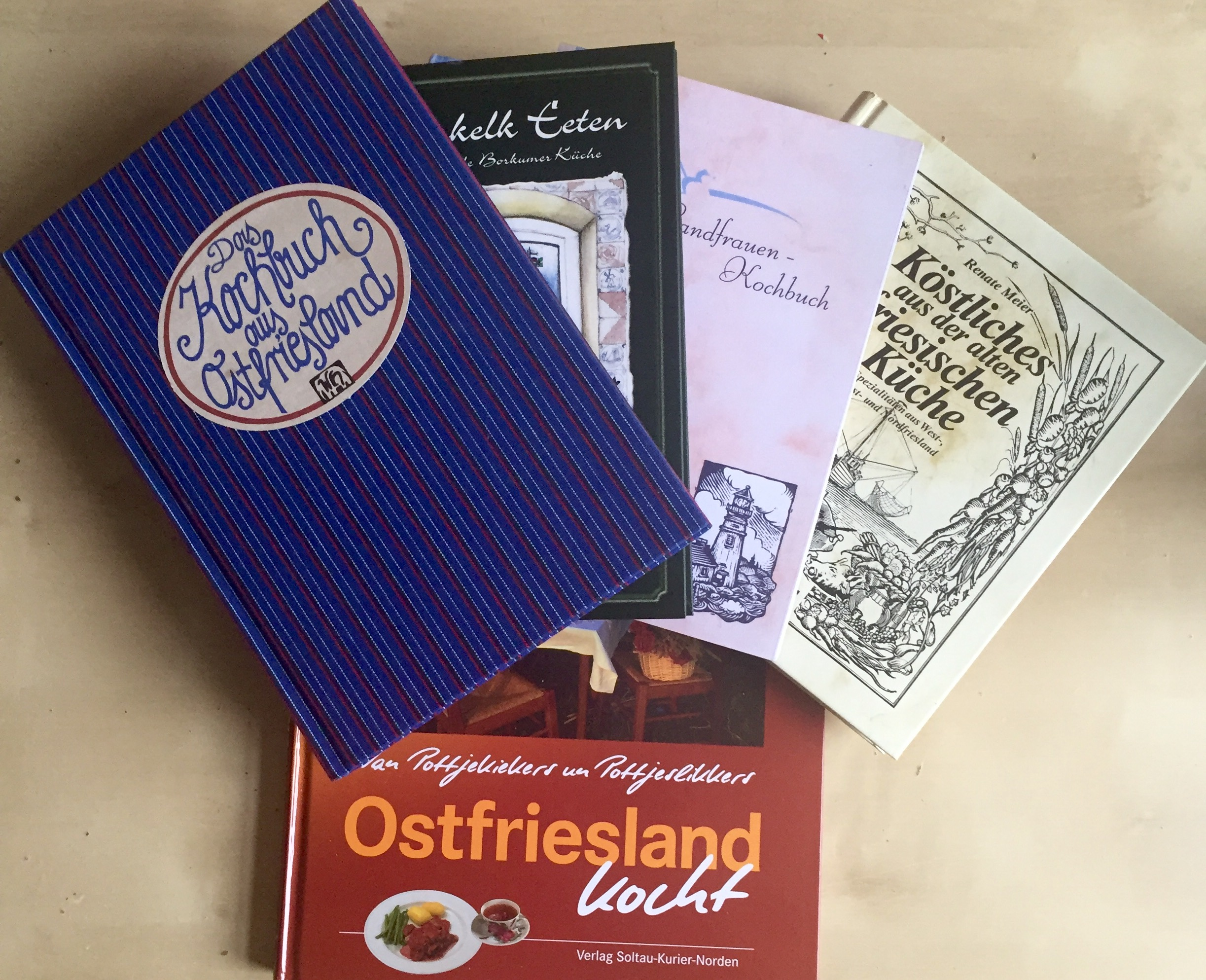 Kochbücher aus Ostfriesland